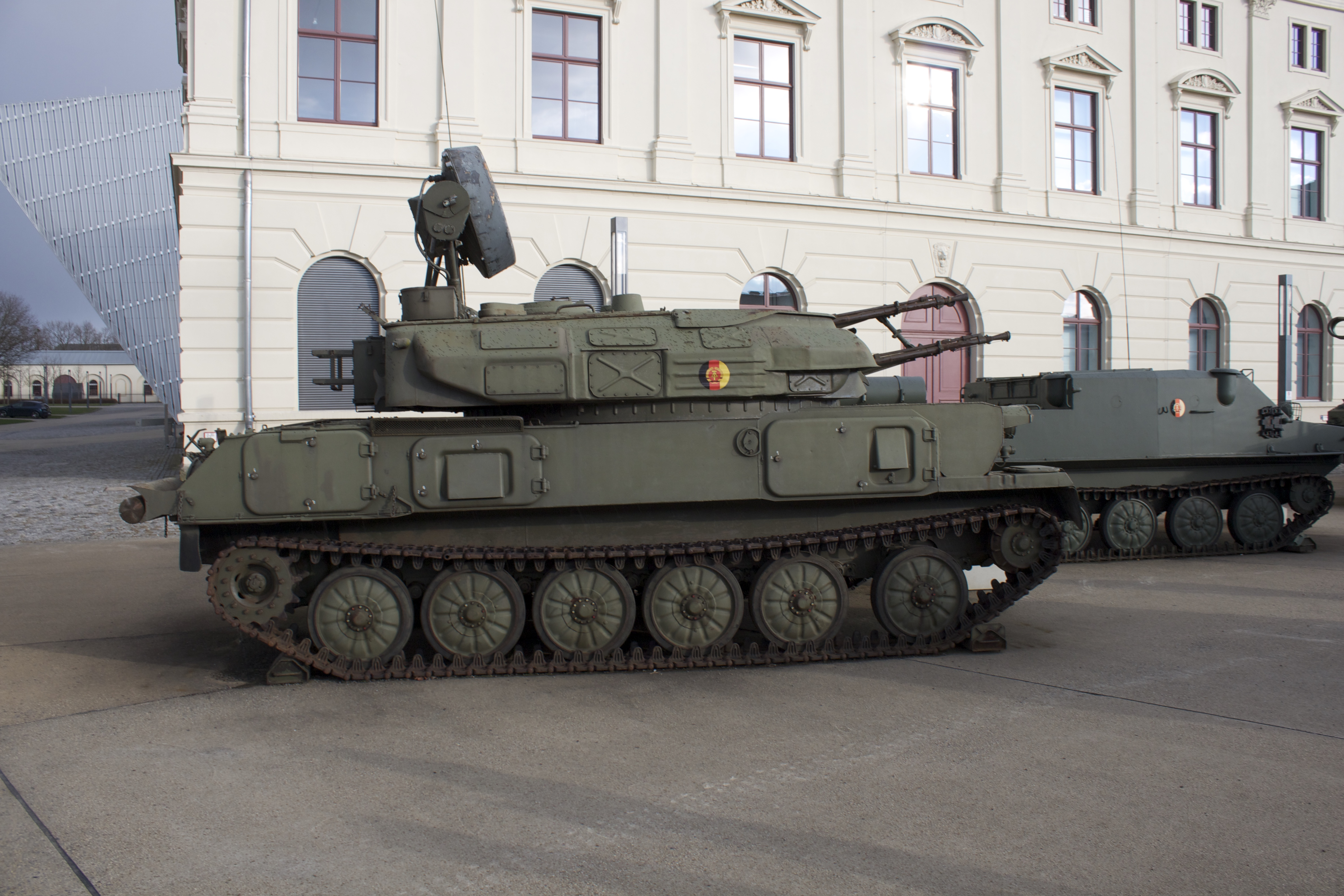 ZSU 23/4W1 "Schilka" im Militärhistorisches Museum der Bundeswehr in Dresden